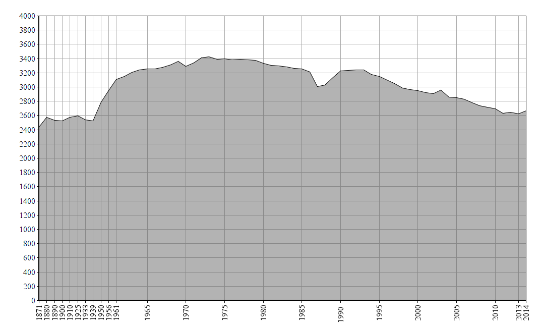 Dieses Bild zeigt die Bevölkerungsstatistik von Bad Peterstal-Griesbach